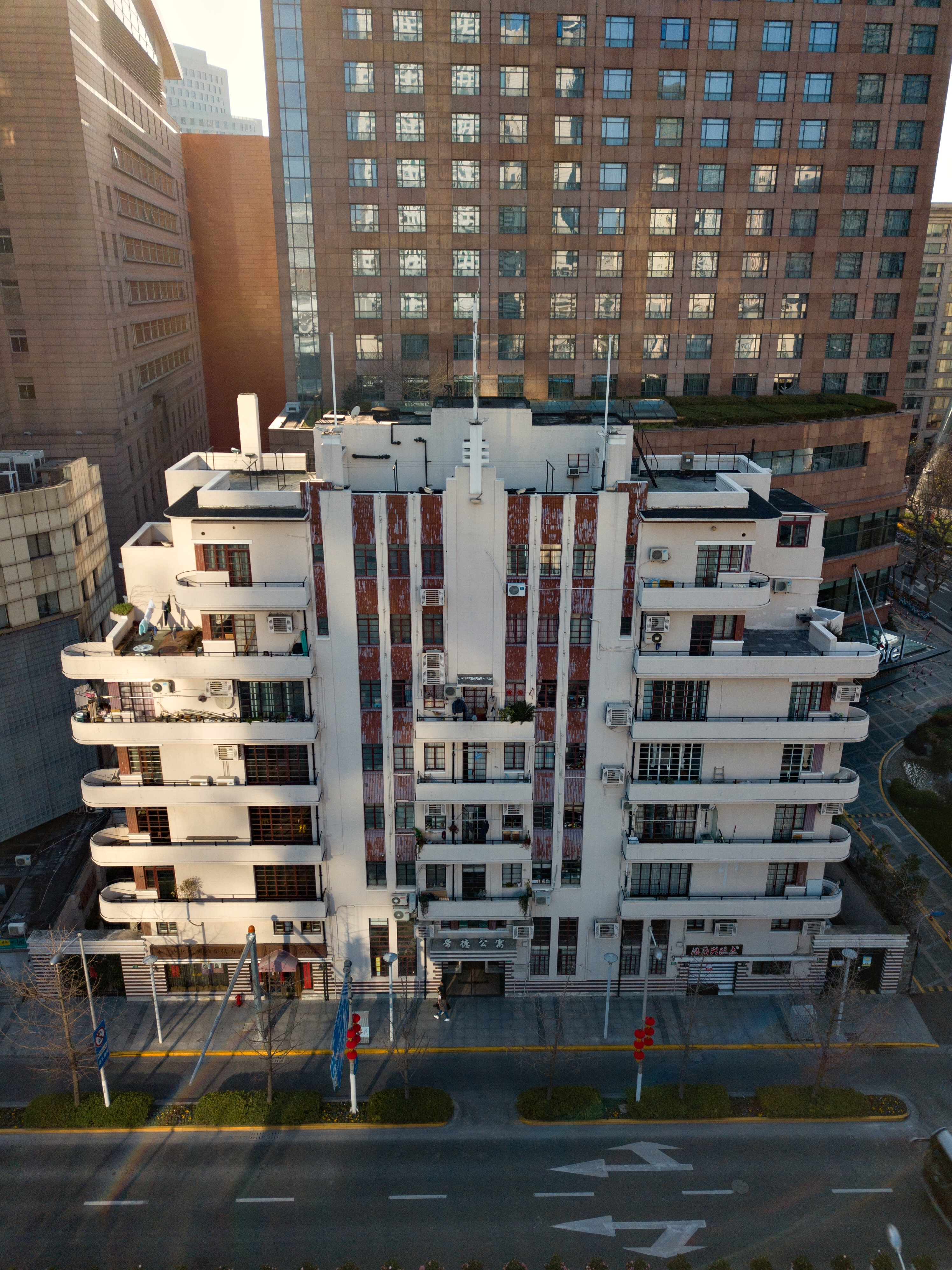 中文（中国大陆）: 常德公寓·爱林登公寓·上海